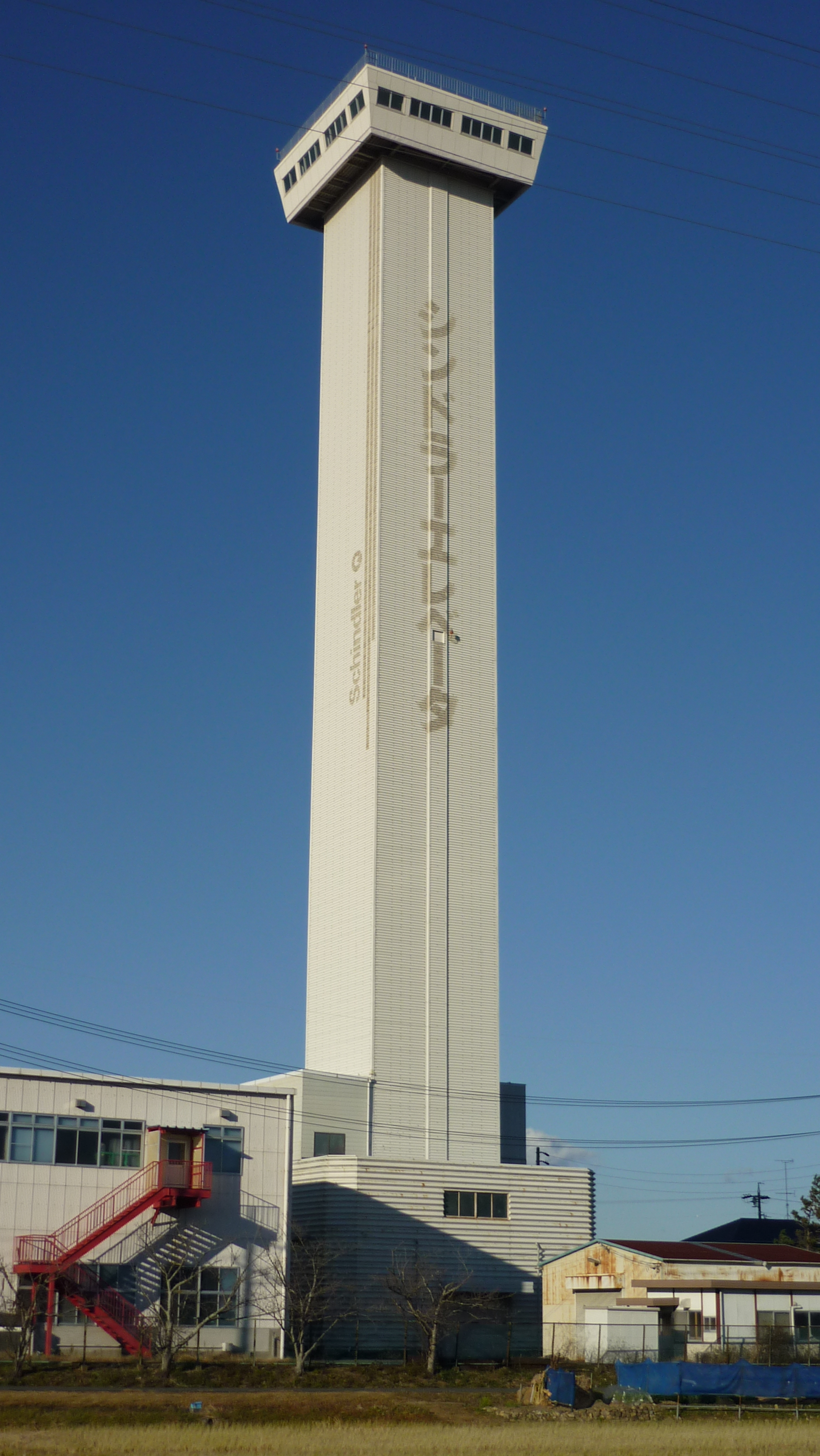 袋井市にあるオーチス・エレベータサービスの工場